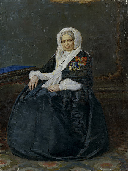 Екатерина Владимировна Родзянко, ур. Квашнина-Самарина (1794-1877), жена М.П.Родзянко, фрейлина, начальница Училища ордена св. Екатерины в С.-Петербурге.